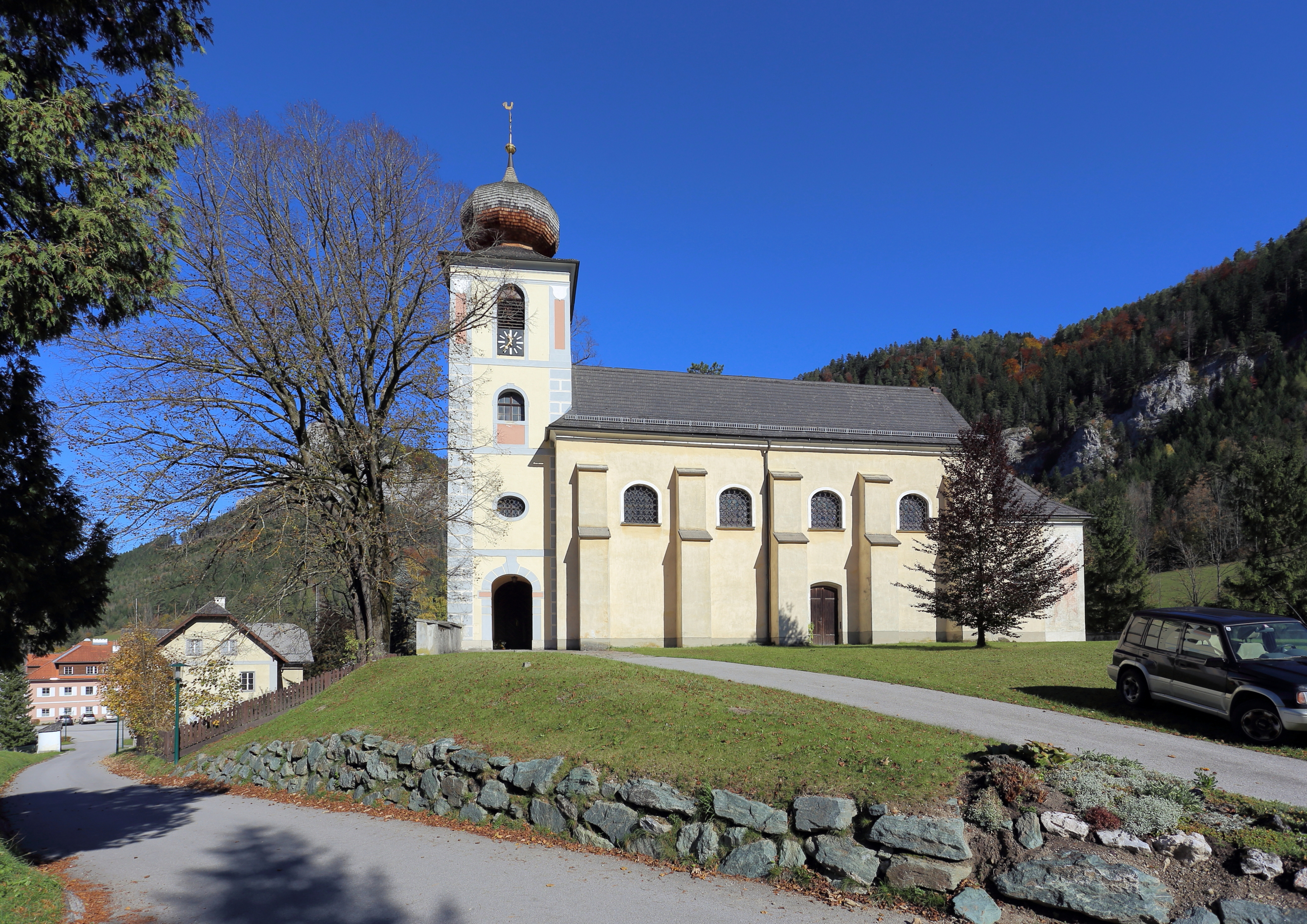 Die katholische Pfarrkirche hl. Nikolaus der niederösterreichischen Marktgemeinde Schwarzau im Gebirge. Eine spätromanische Chorquadratkirche aus dem zweiten Viertel des 13. Jahrhunderts, die Anfang des 18. Jahrhunderts barockisiert wurde.